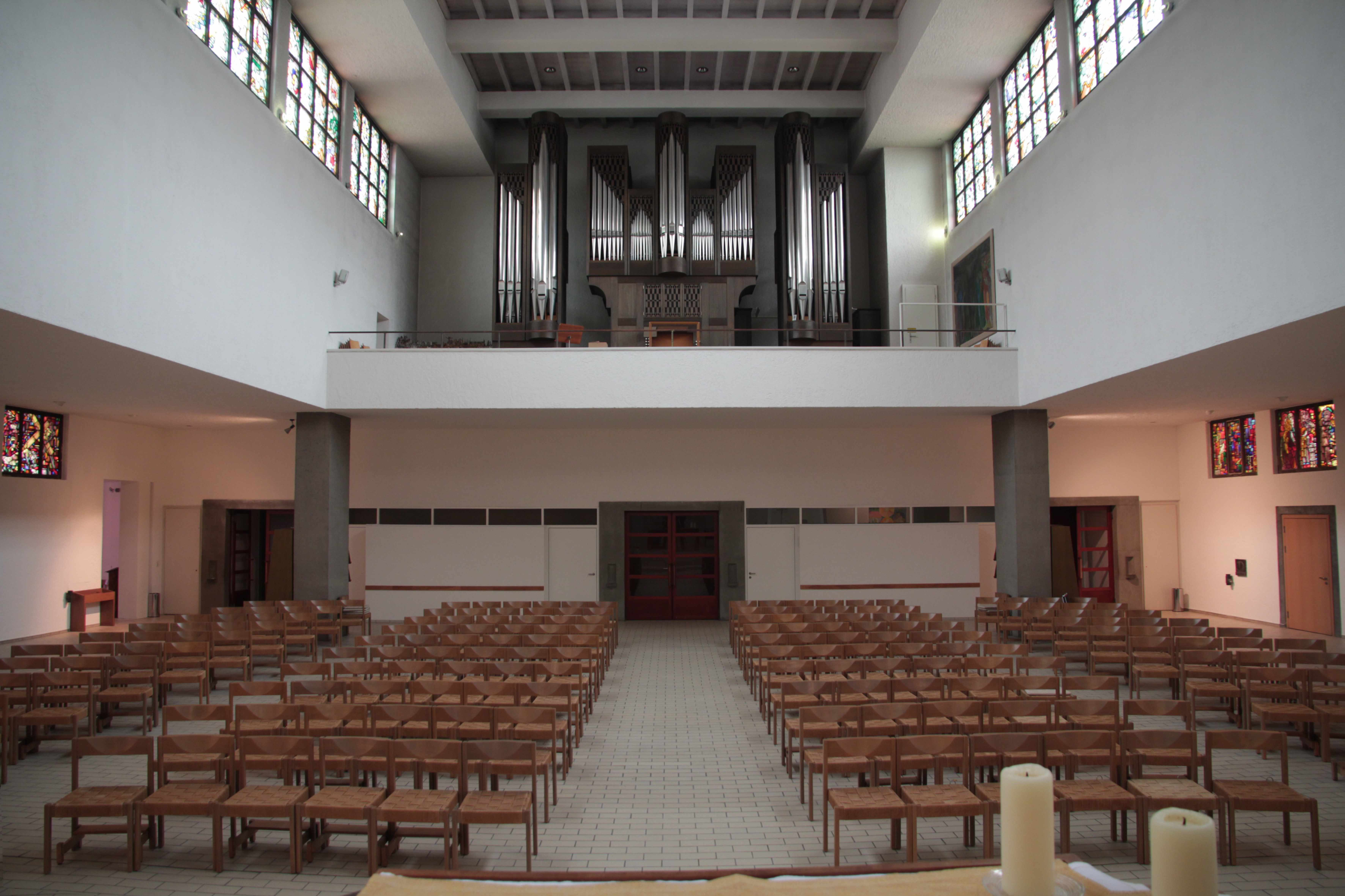 Römisch-katholische Kirche Bruder Klaus Zürich, Blick zur Orgel